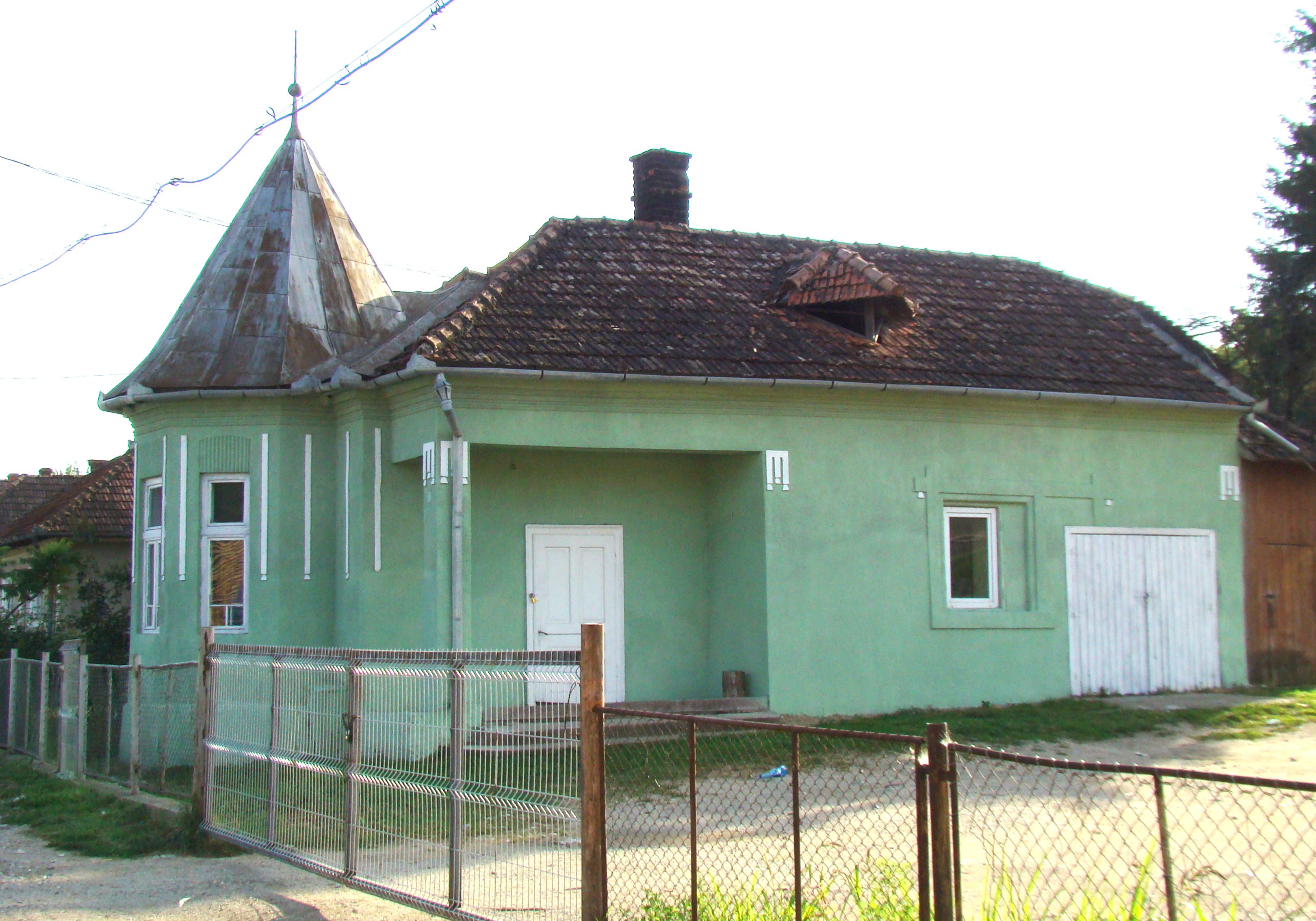 Casa Hatfaludy, sat Hida; comuna Hida, județul Sălaj